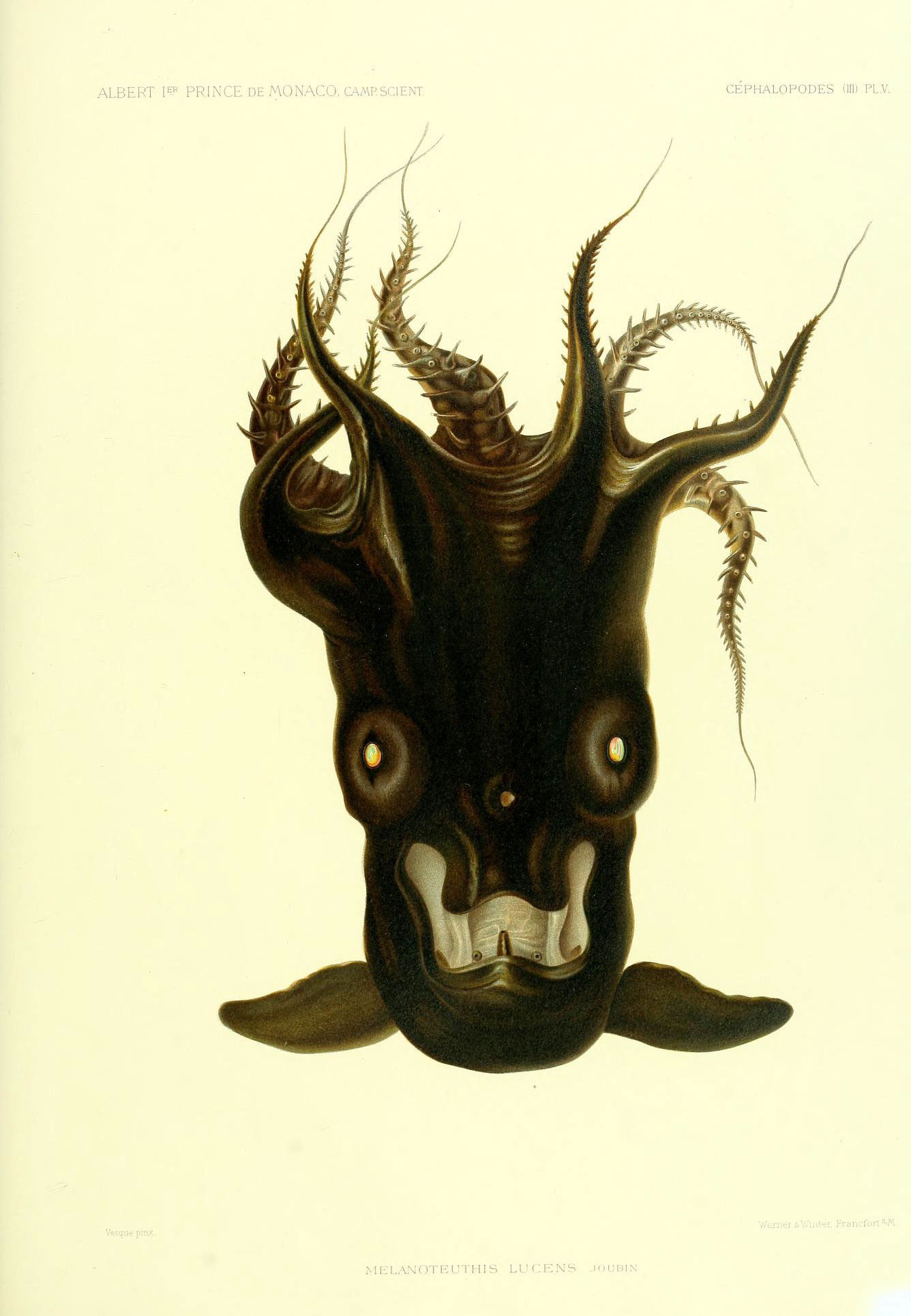 4 ALBERT Rf^ PRINCE DE MONACO, CAMP.SCIENT. CEPHALOPODES (111) PL.V. Vesquepinx. Wenier àWinfer, Francfort ^/M. MELANOTEUTHIS LUCENS JOUBlN